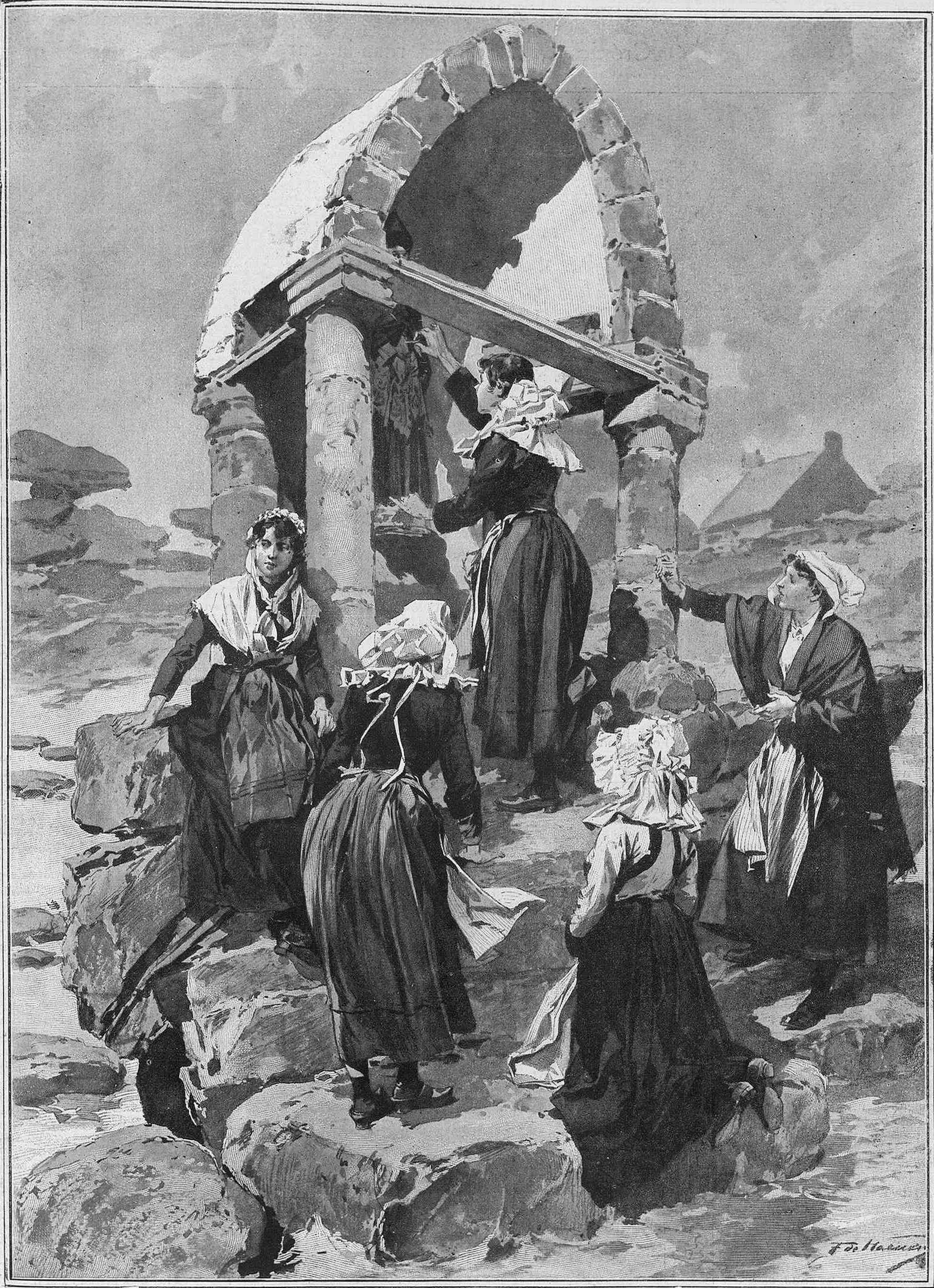 Costumbres bretonas. — Jóvenes que acuden a visitar a San Guirec el día de Santa Catalina para conseguir un marido antes de terminar el año. (Dibujo del natural de F. de Haenen), en la revista española La Ilustración Artística.